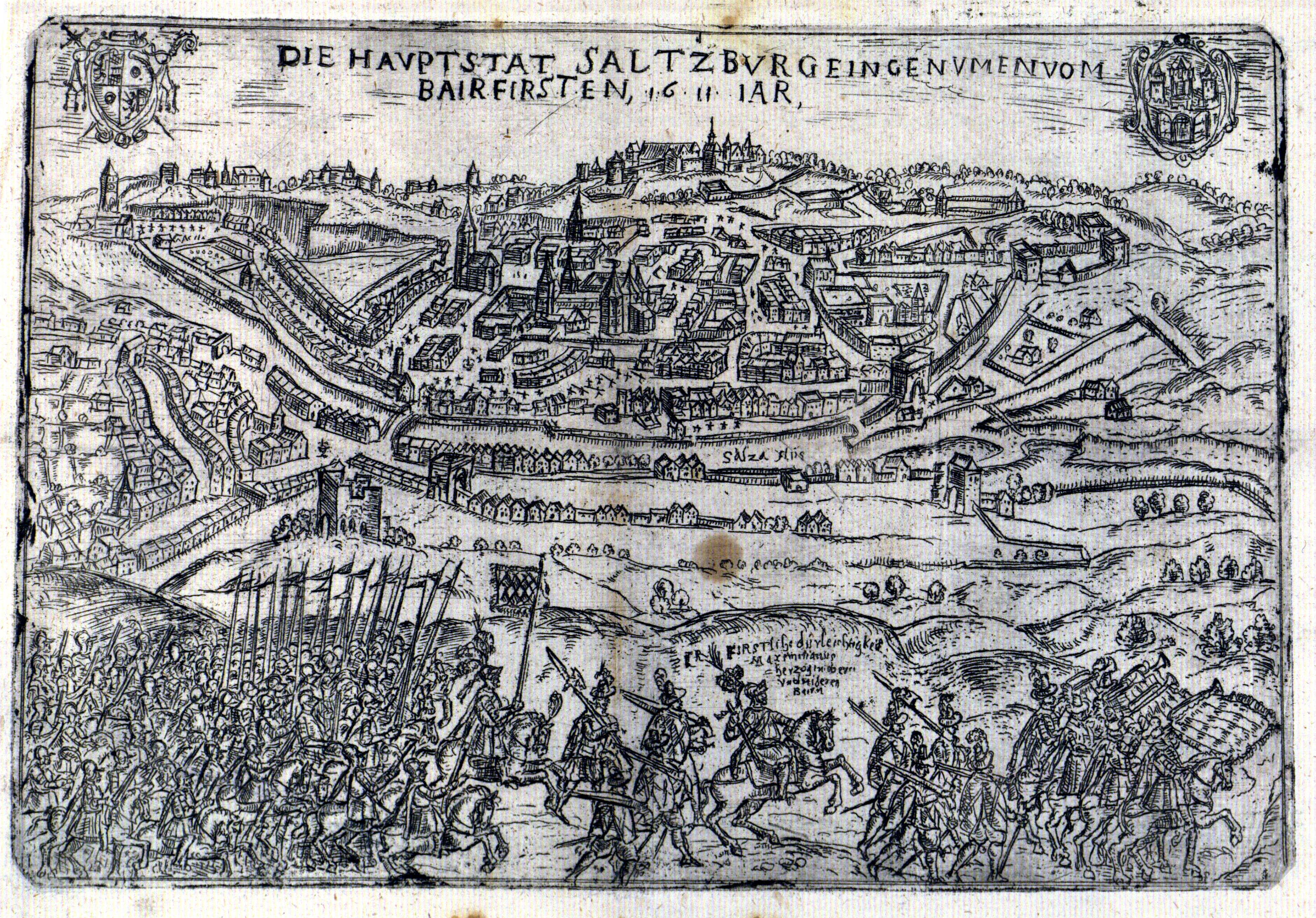 DIE HAVPTSTAT SALTZBVRG EINGENVMEN VOM//BAIR FIRSTEN, 1611 IAR., Radierung, 1611 (Salzkrieg bzw. Ochsenkrieg 1611)